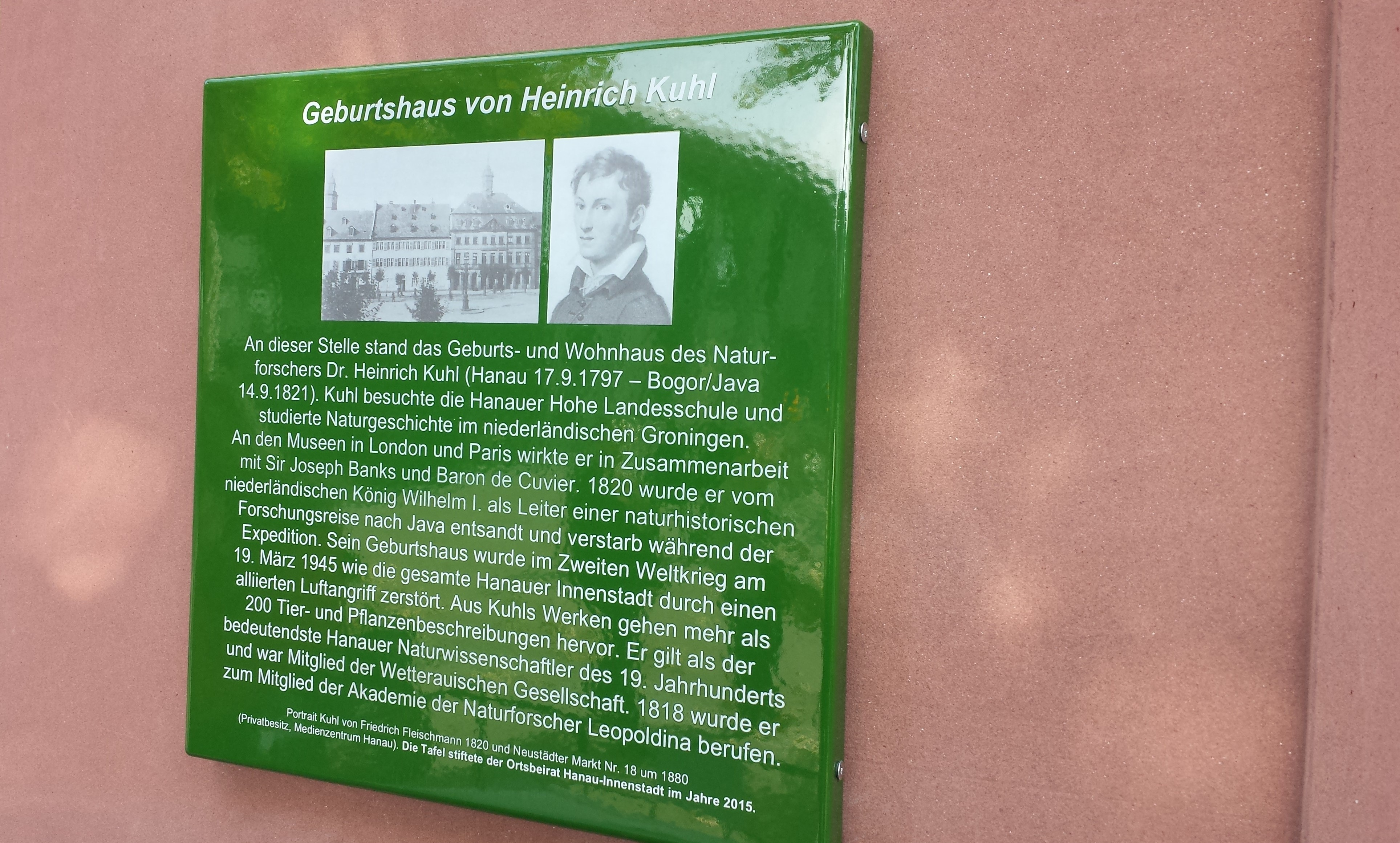 Gedenktafel Heinrich Kuhl (1797-1821), Hanau